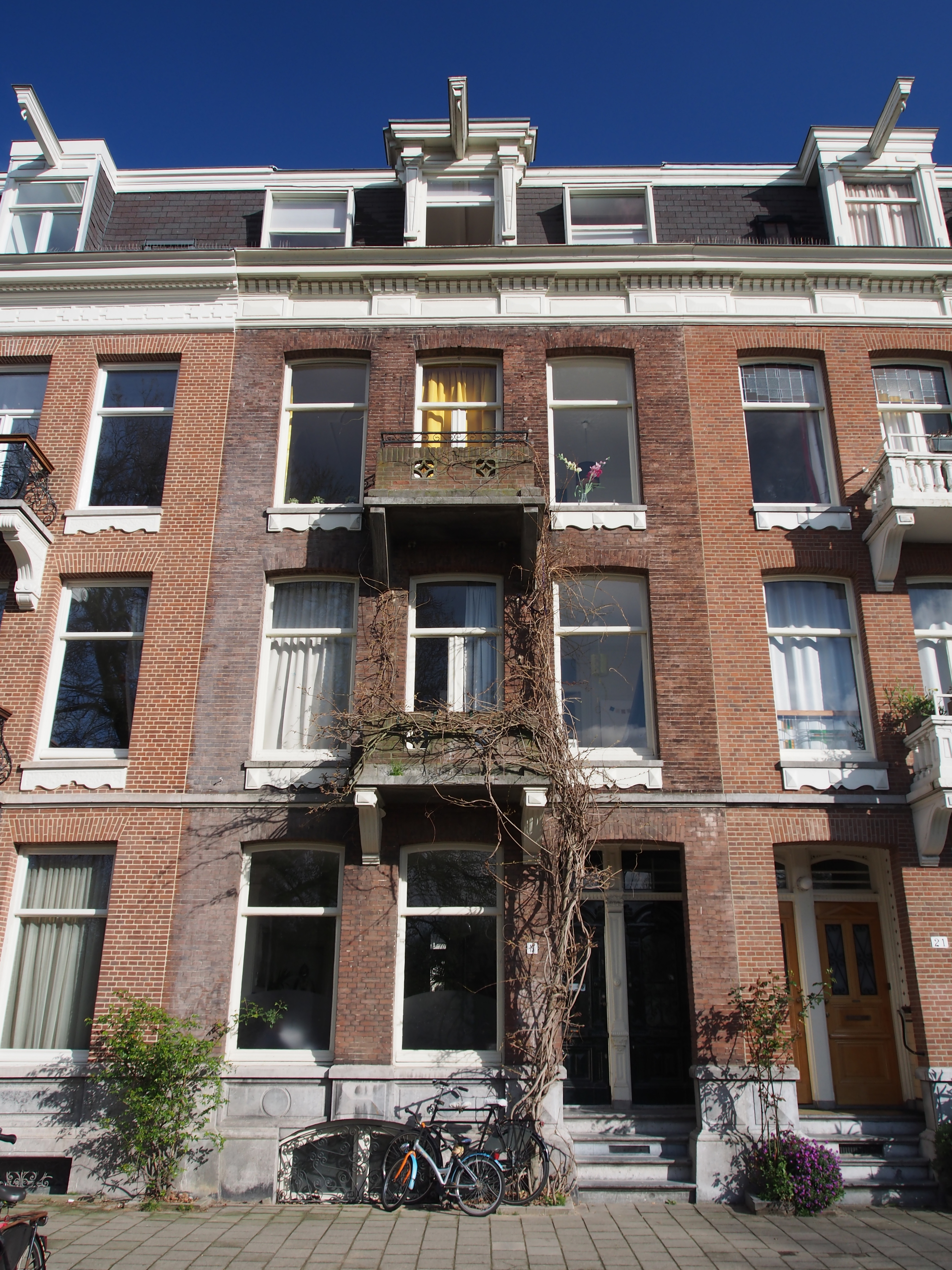 Monument in Amsterdam.